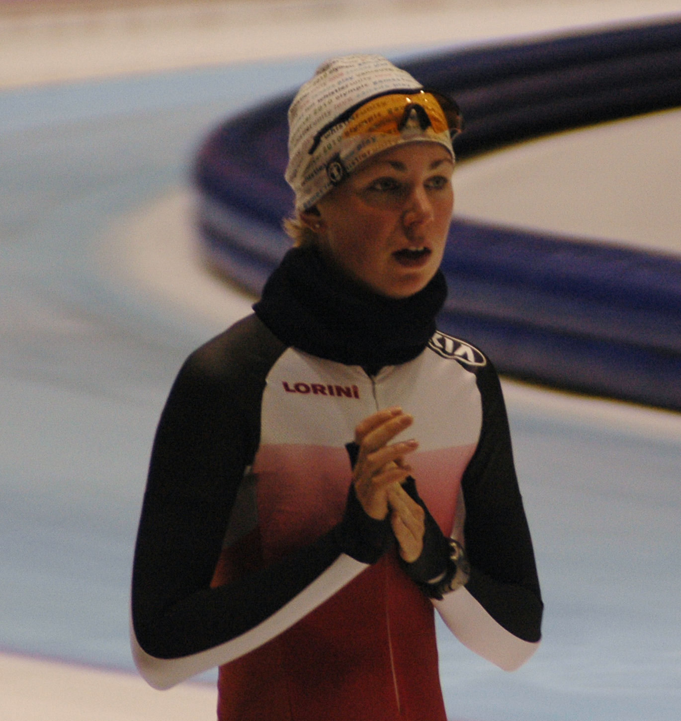 Anna Rokita (AUT) at WorldCup speedskating in Heerenveen (NED)